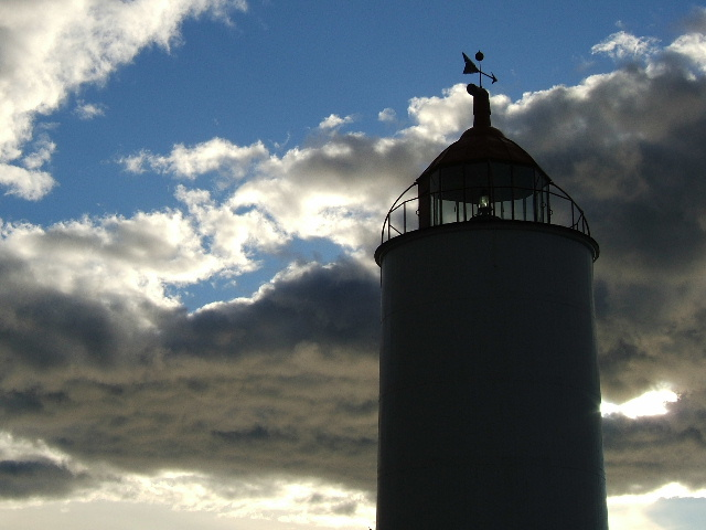 Phare de l'île Verte sur le fleuve Saint-Laurent, au Québec, Canada.